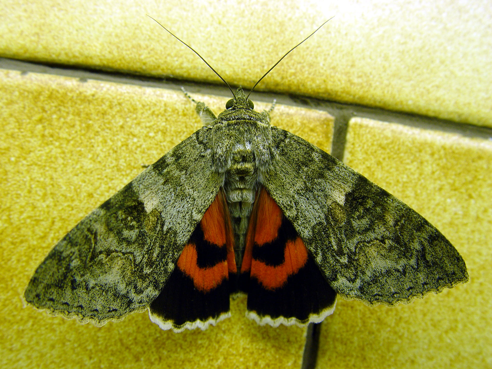 Catocala nupta (Linnaeus, 1767)